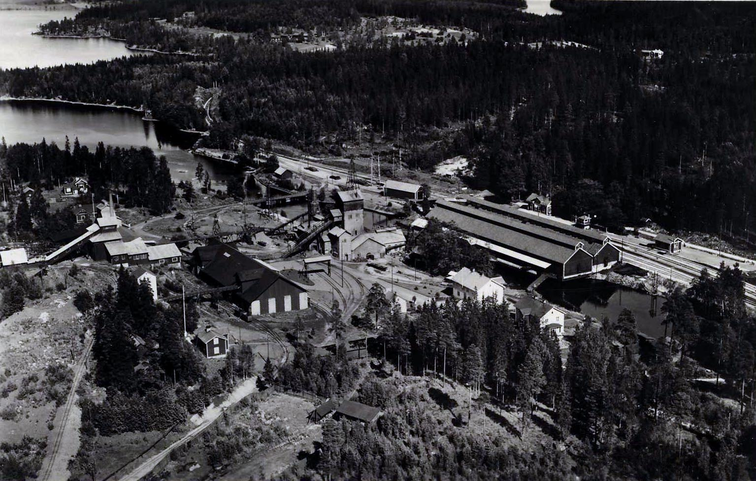 Flygfoto över Sikfors bruk